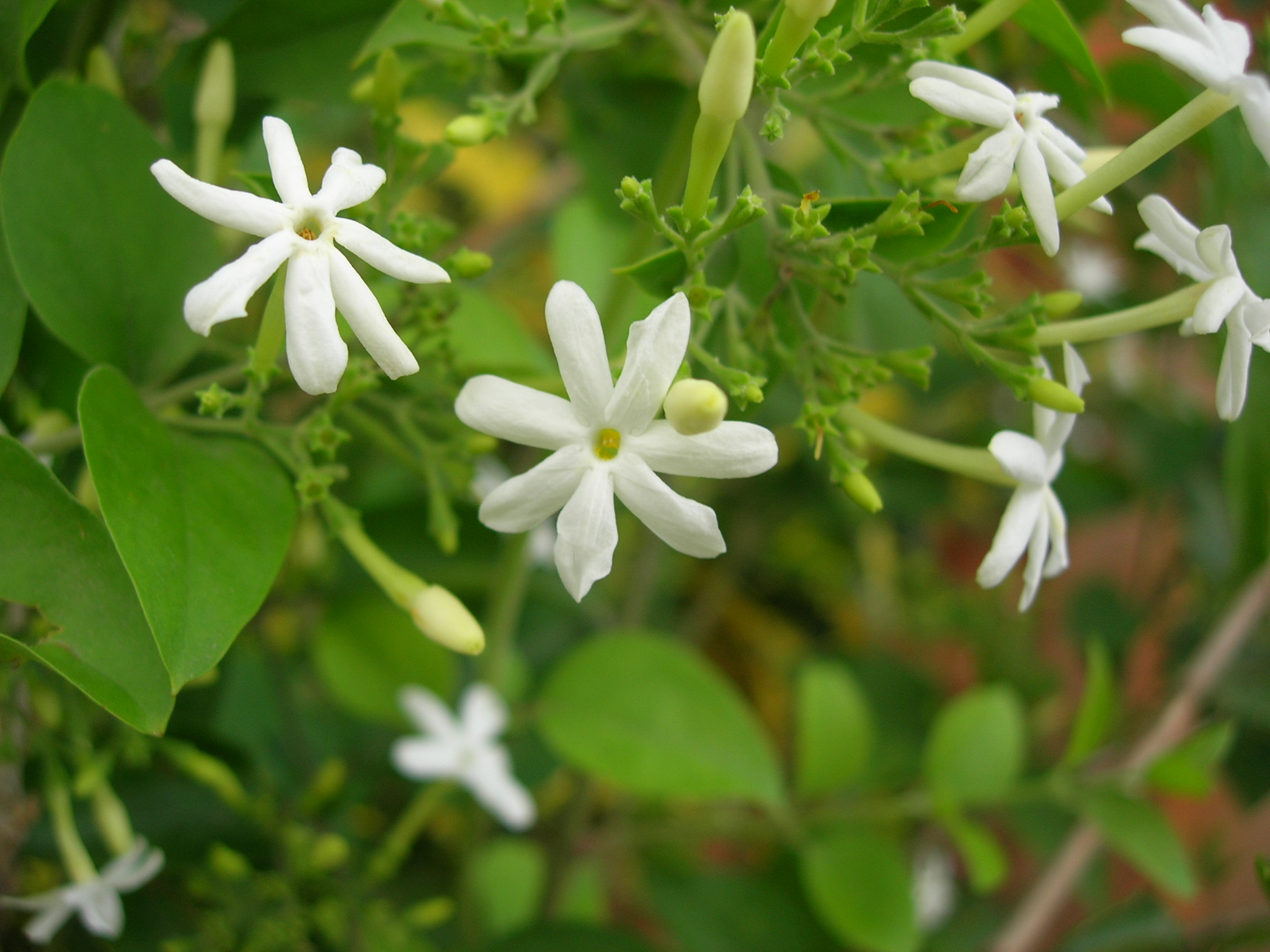 Jasmine. Mysooru Mallige, Mysore Mallige